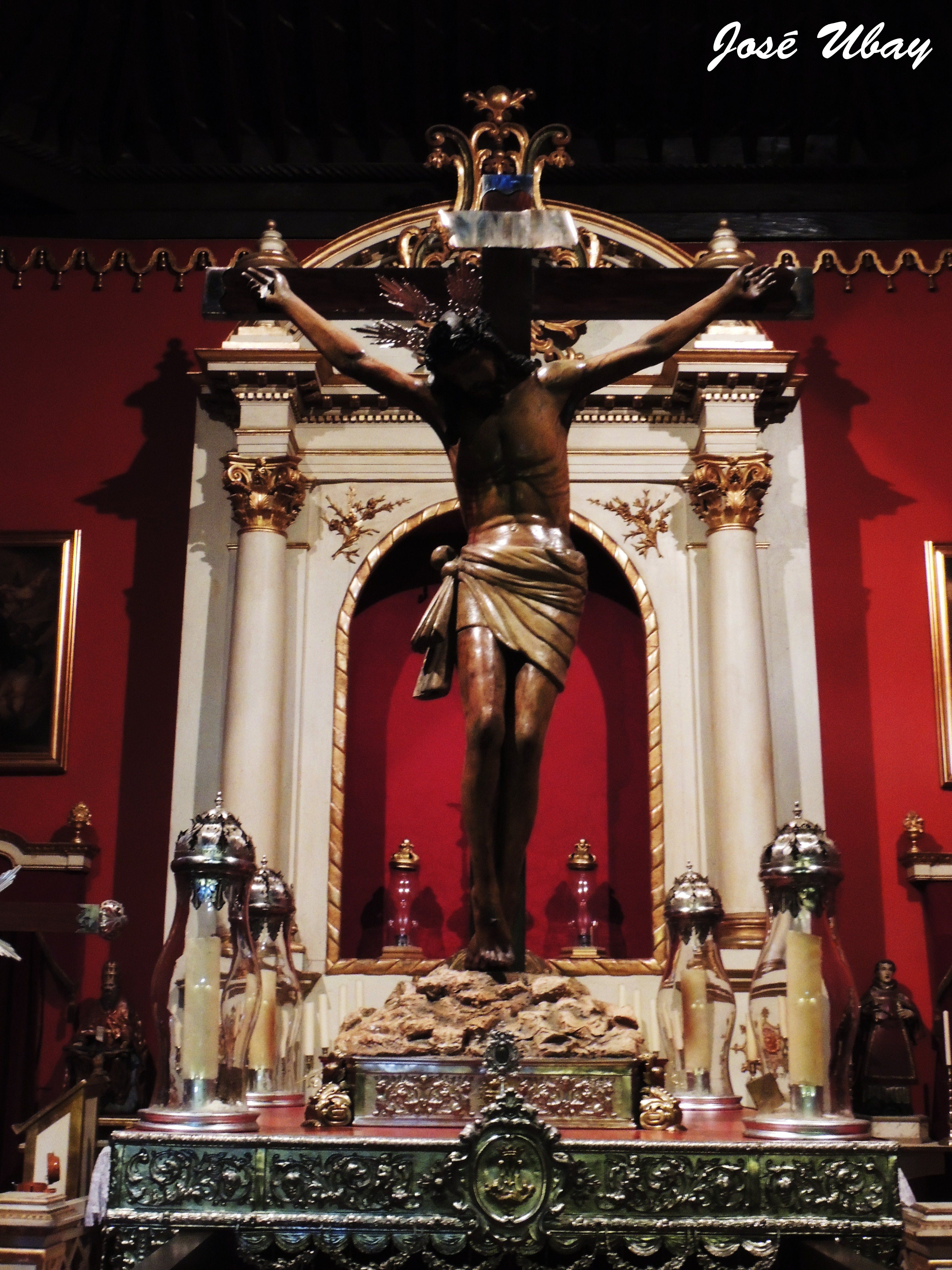 Santísimo Cristo del Buen Fin. Anónimo. 1690. Ermita del Espíritu Santo. Las Palmas de Gran Canaria.